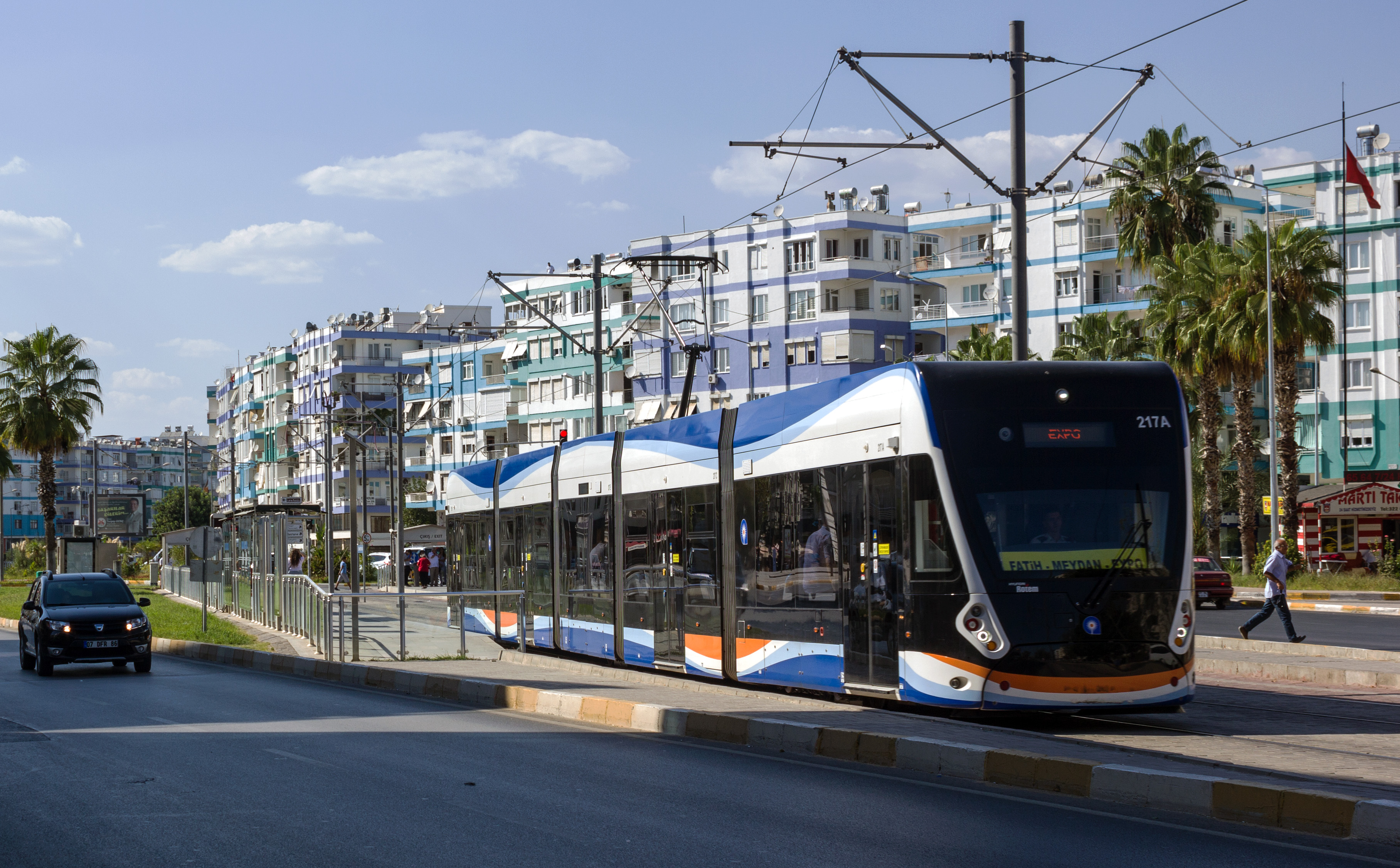 Анталья. Станция Burhanettin Onat скоростного трамвая (AnTray)